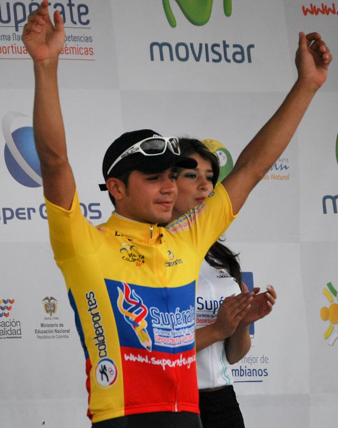 Ganador del prólogo de la Vuelta a Colombia 2012, Fabio Duarte